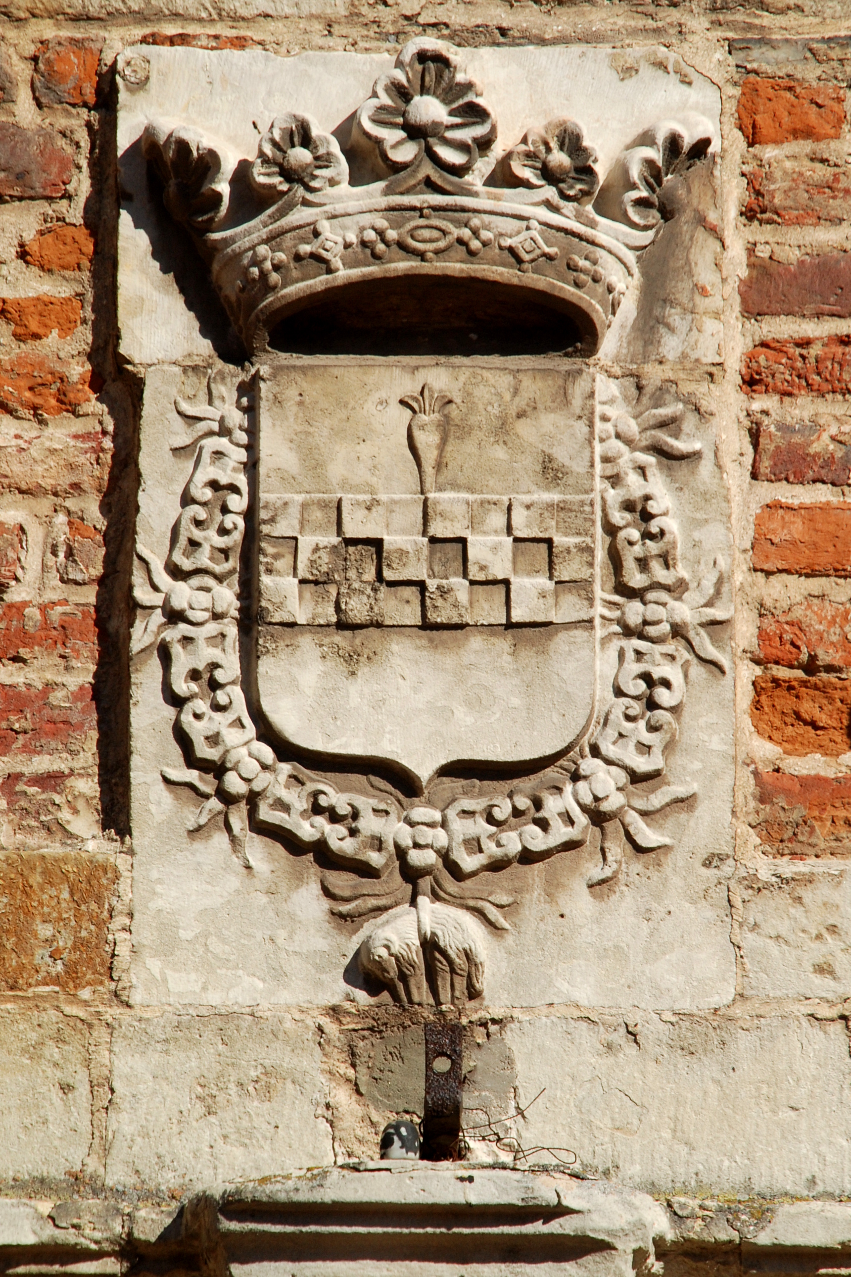 Belgique - Brabant wallon - Château de Rixensart - Blason surmontant le portail de la cour intérieure